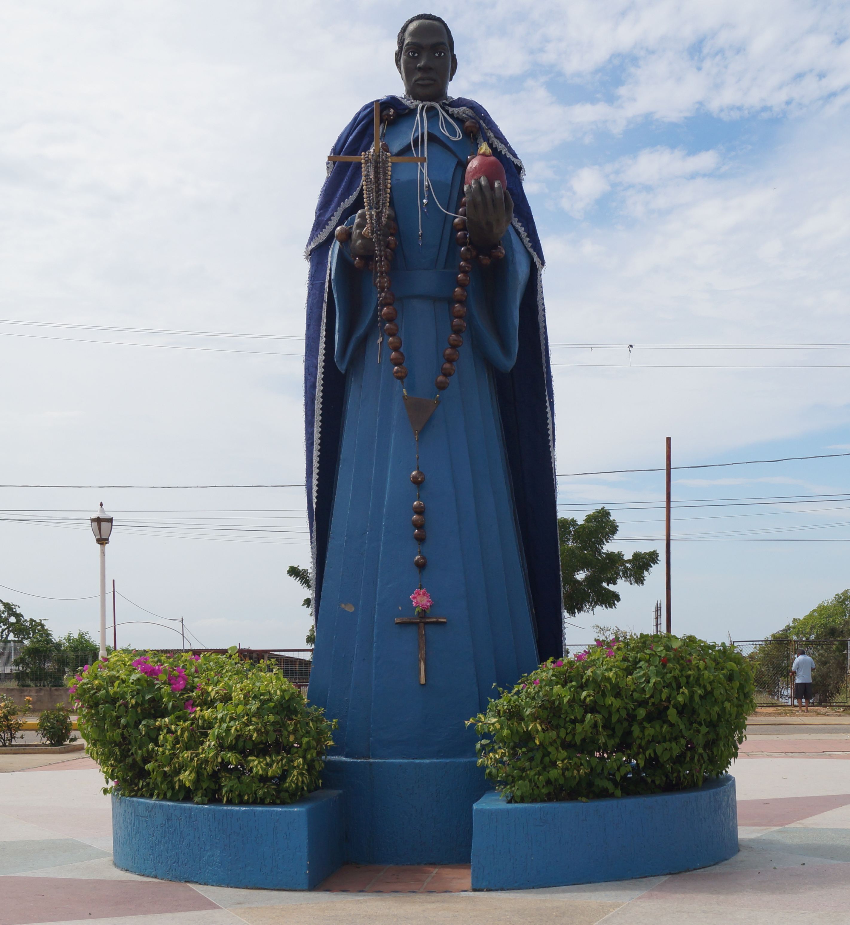 San Benito de Palermo. Estatua ubicada en el municipio Santa Rita, Av Pedro Lucas Urribarrí. Puerto Escondido. Estado Zulia